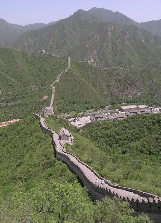 居庸关长城(Juyongguan Great Wall)